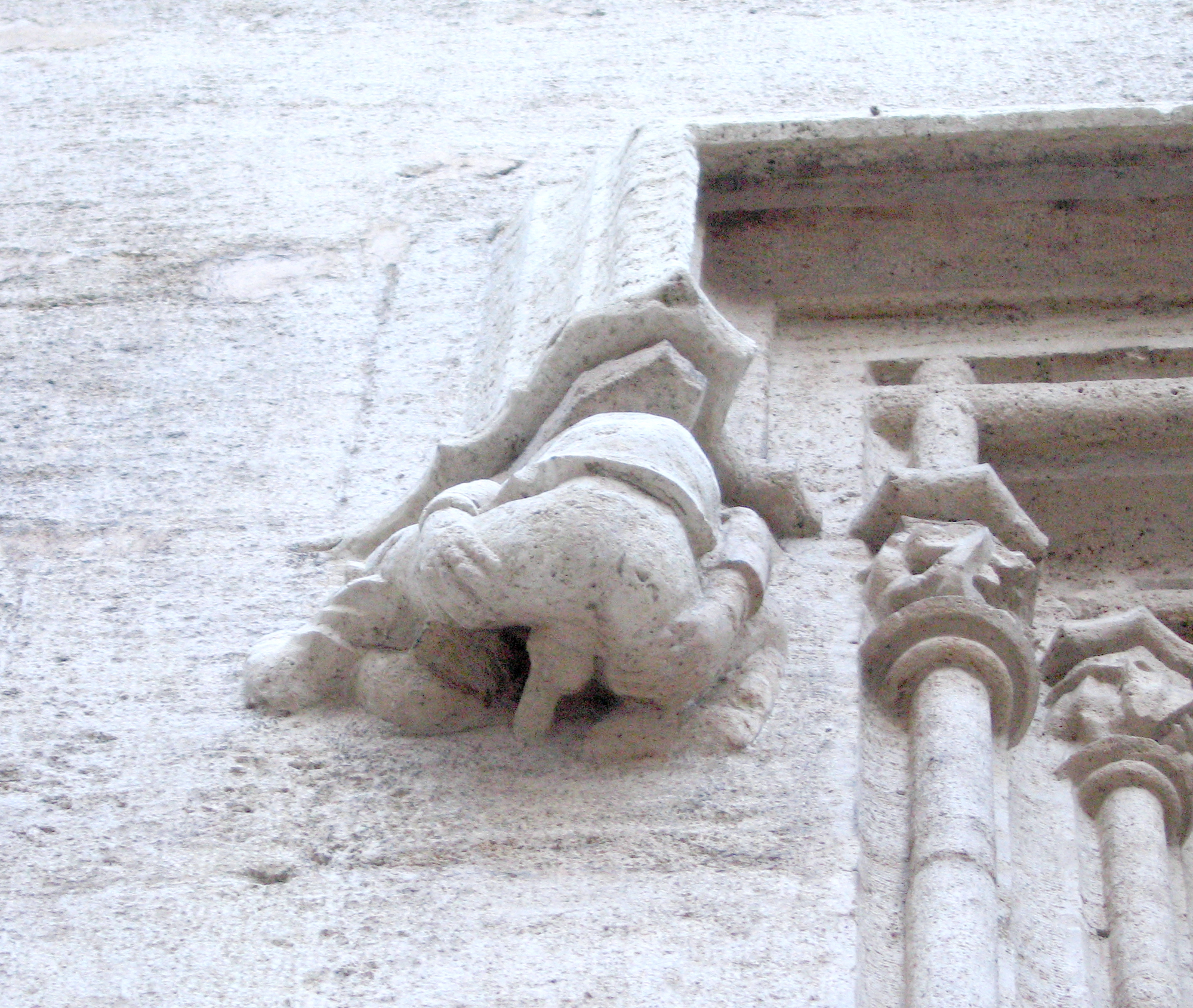 Imatge de figureta satírica en la Llotja de la seda (València, Spain)